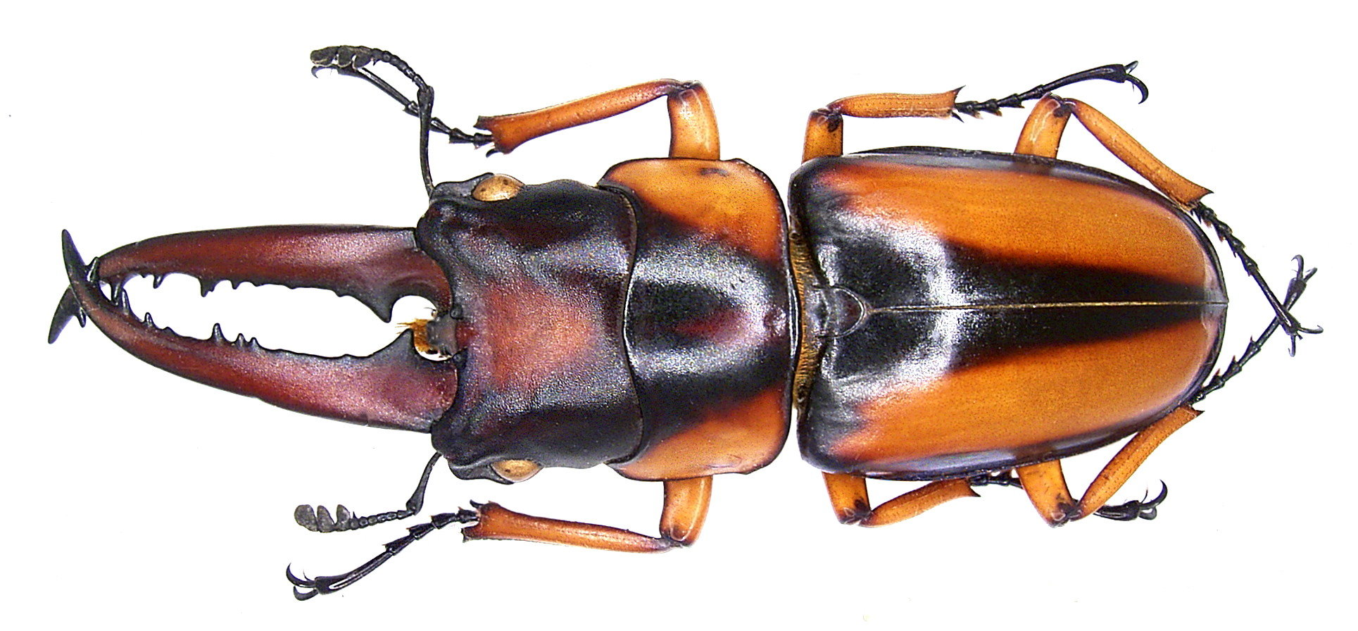 Familie: Lucanidae Groesse: 36-63 mm Verbreitung: Zentral- und Ostafrika Fundort: Kenia, Rondo, Kakamega-Regenwald, 1650 m leg. U.Eitschberger, 1997; det. U.Schmidt Photo: U.Schmidt, 2007